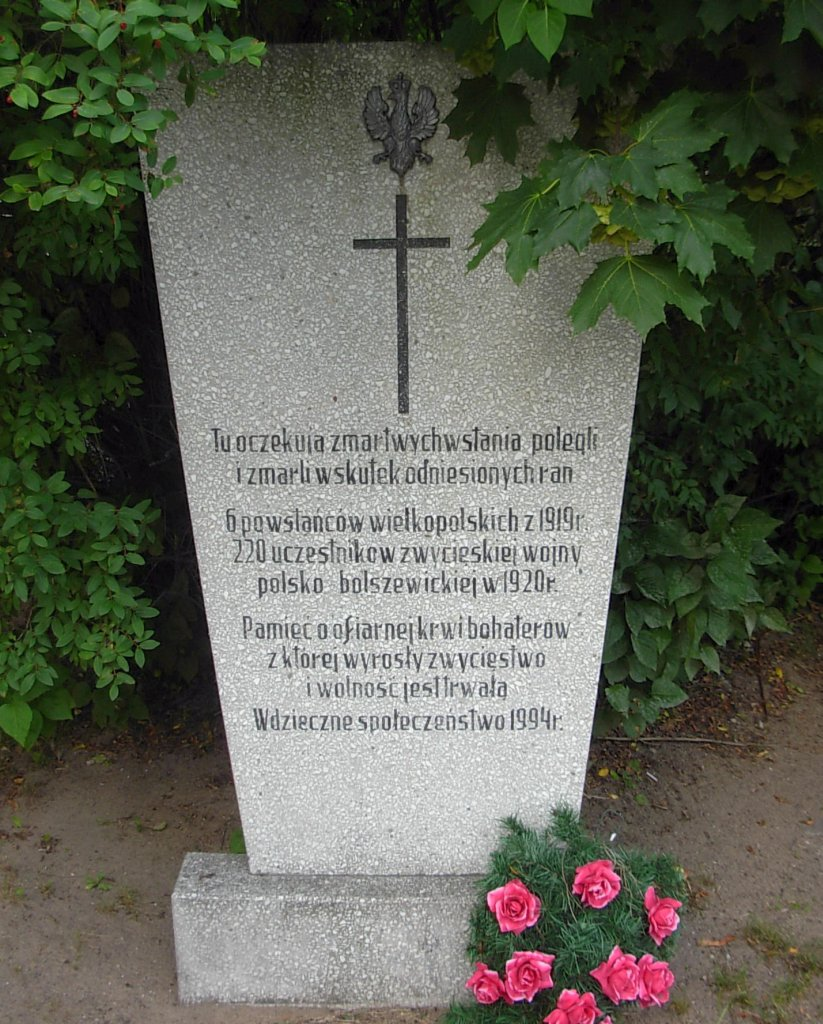 Cmentarz Nowofarny Bydgoszcz, mogiła powstańców wielkopolskich